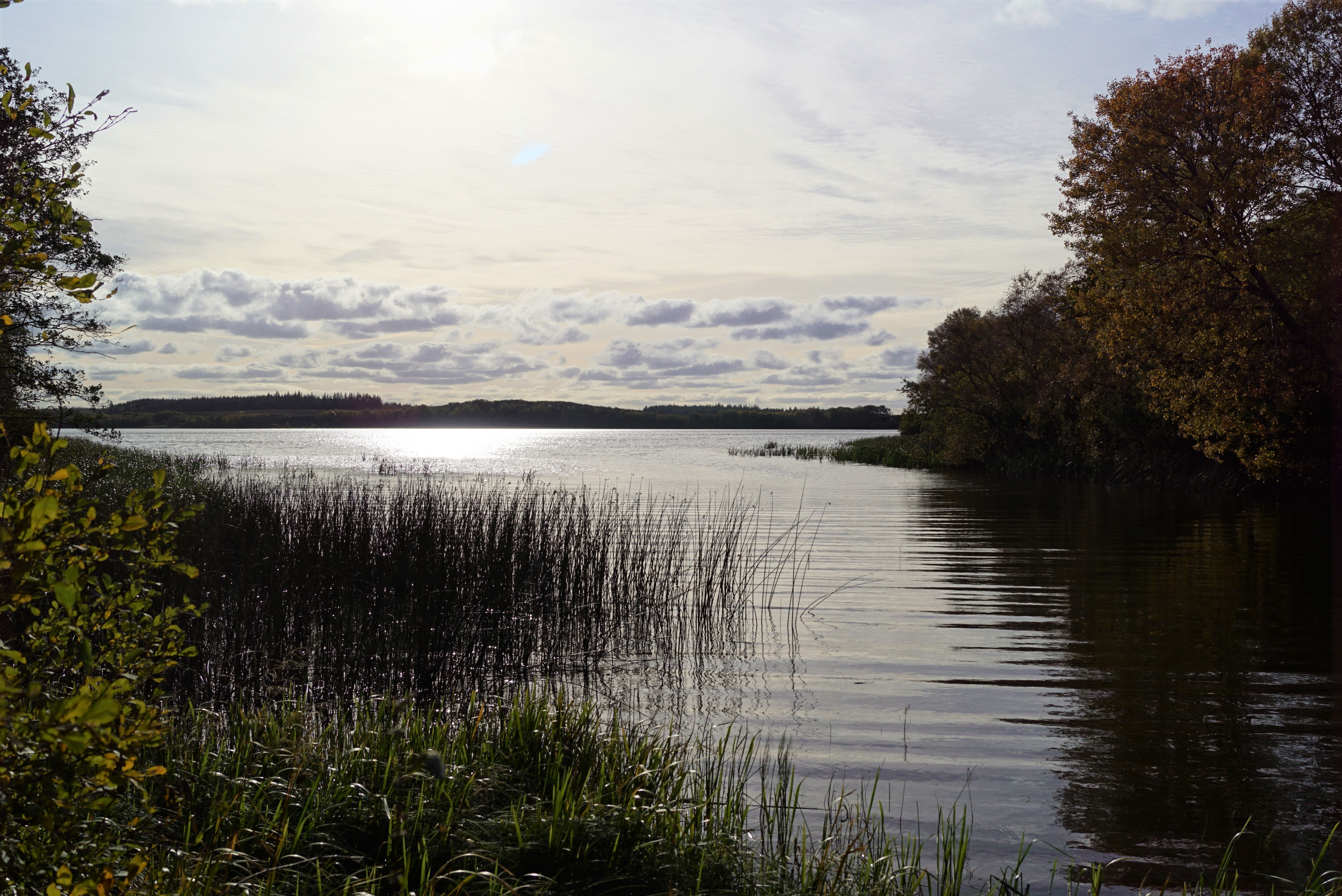 Flyndersø set mod syd fra Snævringen